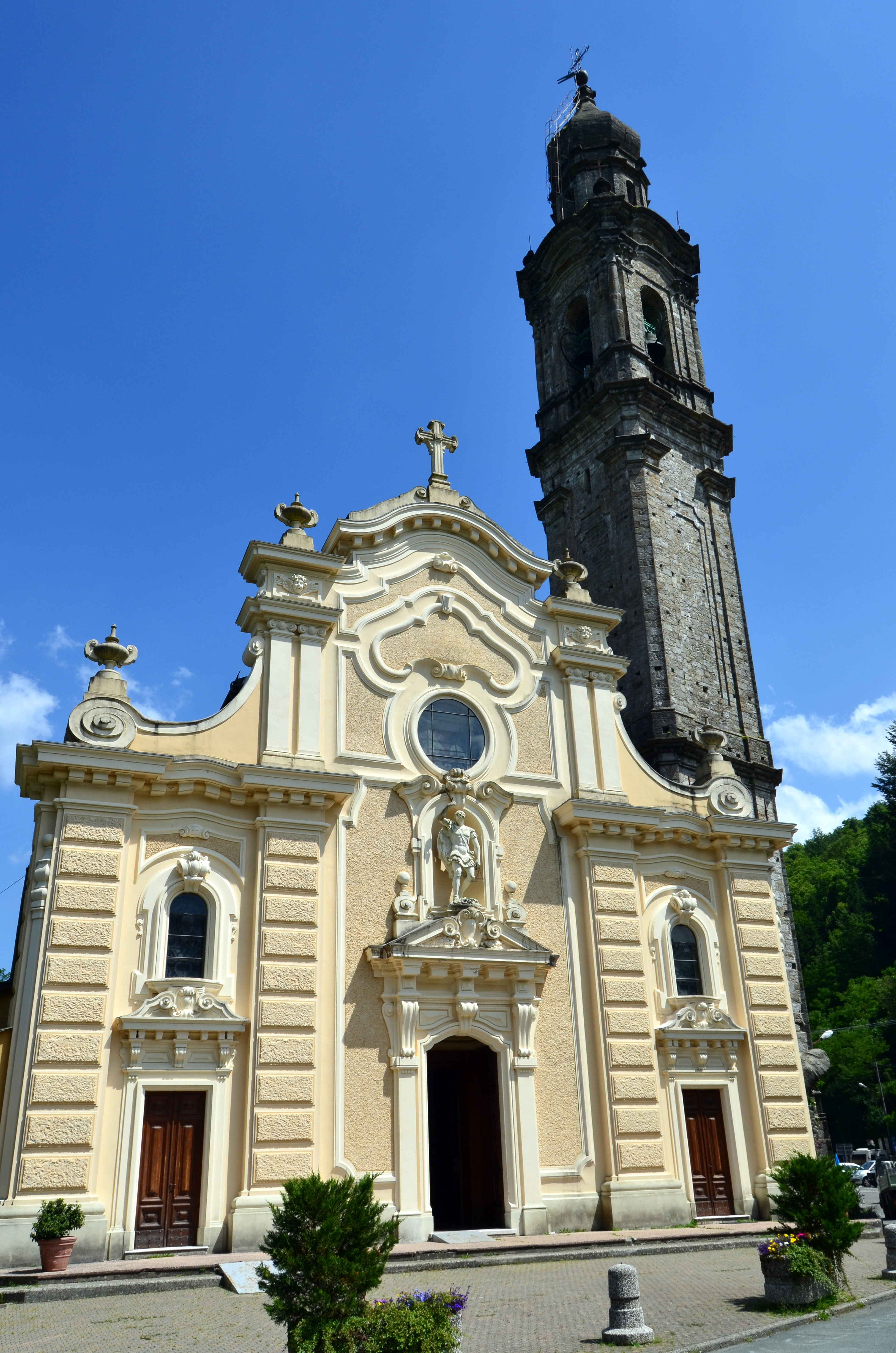 La chiesa di San Michele Arcangelo, Rezzoaglio, Liguria, Italia